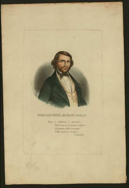 Francisque Arban, aéronaute francais.